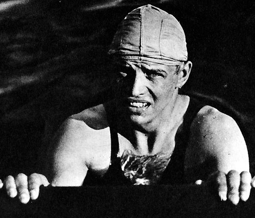 Arne Borg (1901-1987)